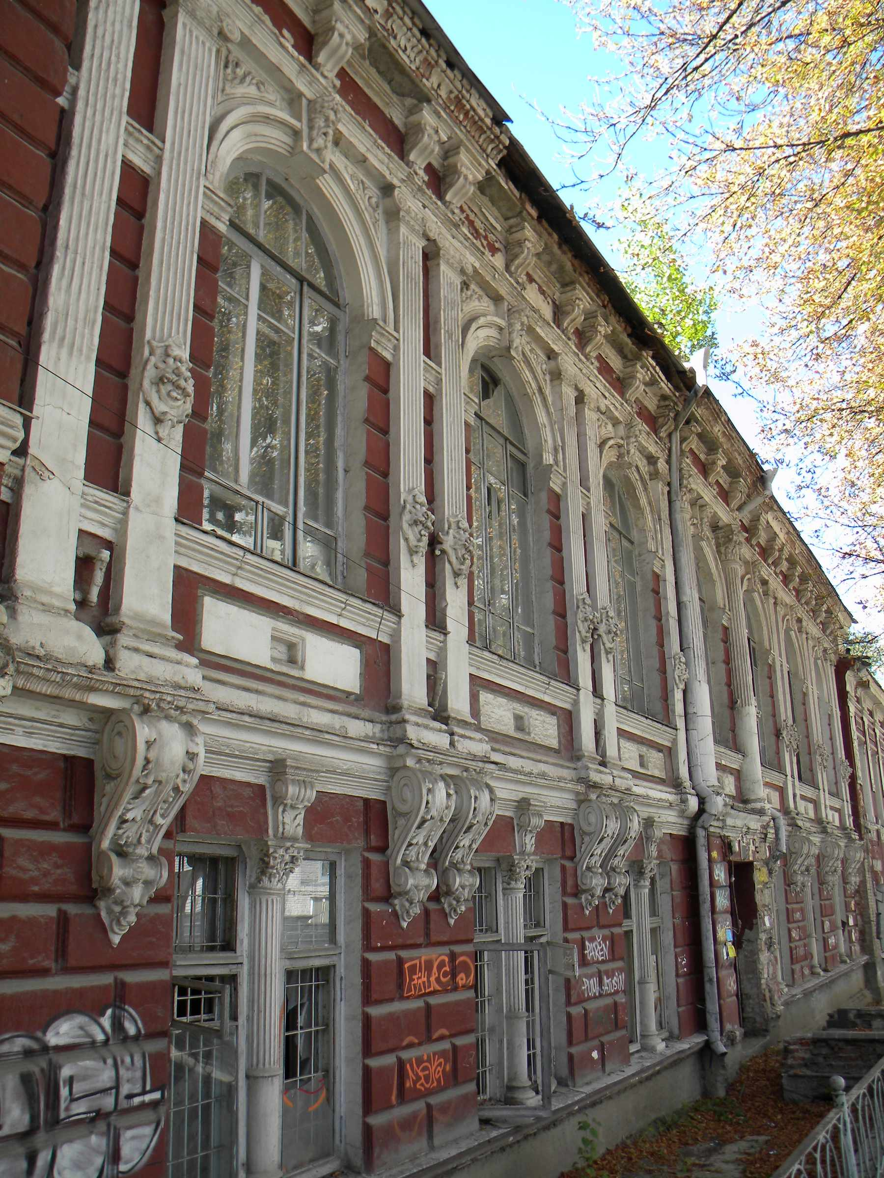 Губернська земська управа. Корпус №1, Дніпро, узв. Крутогірний, 21